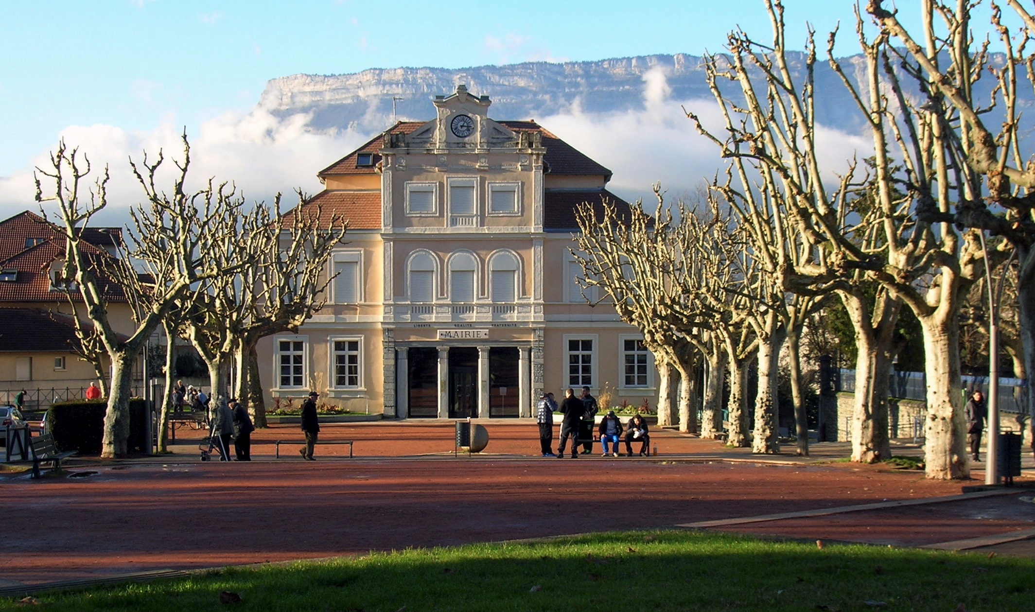 mairie de Domène, Isère, AuRA, France.